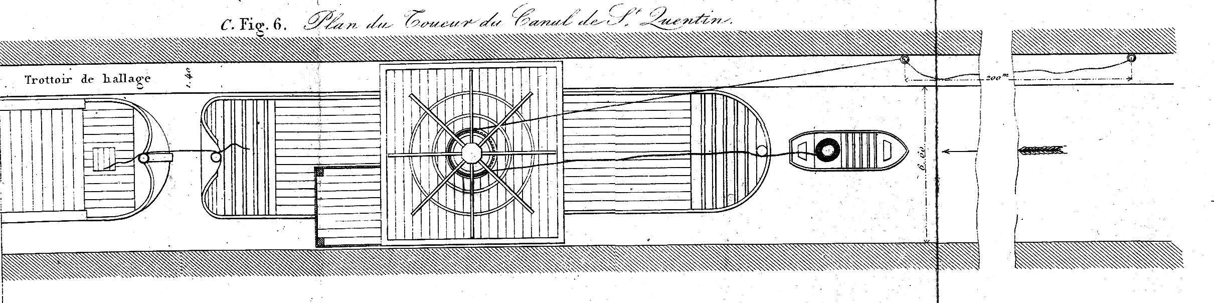 M. Lermoyez: Sur le touage des bateaux dans les souterrains du Canal de Saint-Quentin, In: Annales des ponts et chaussées, Tome VI, Paris 1863, Seite 323-373 Tafel 70 C Fig. 3, Plan du Toueur du Canal de Saint-Quentin